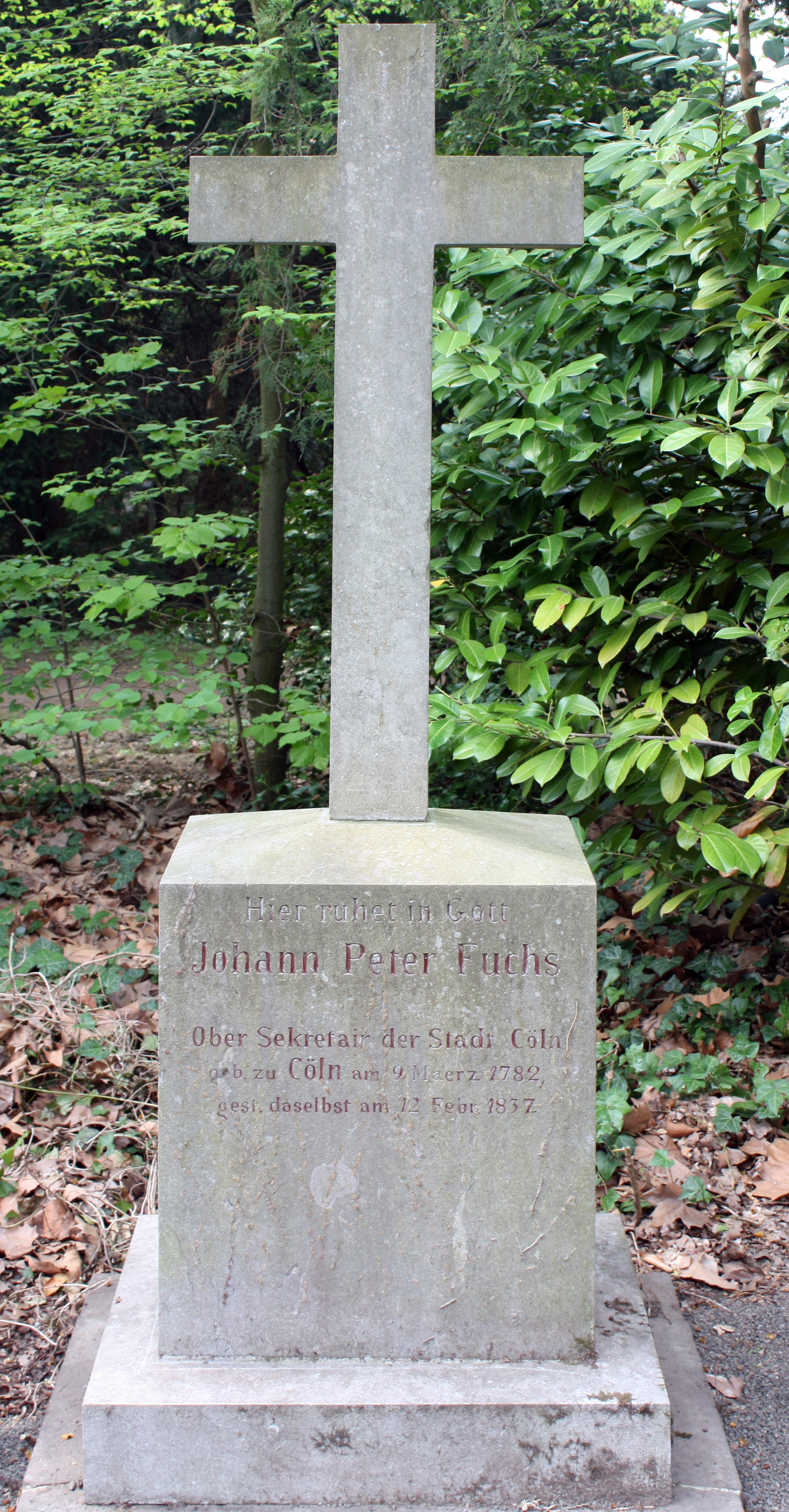 Johann Jakob Peter Fuchs (* 1782 in Köln; † 1837 ebenda),Ober-Sektetär und Archivar der Stadt "Cöln". Grabmal, Melaten-Friedhof, Köln